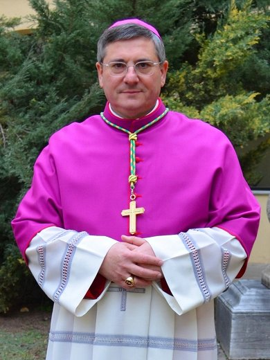 Foto ufficiale di S.E. Mons. Franco Lovignana, Vescovo di Aosta